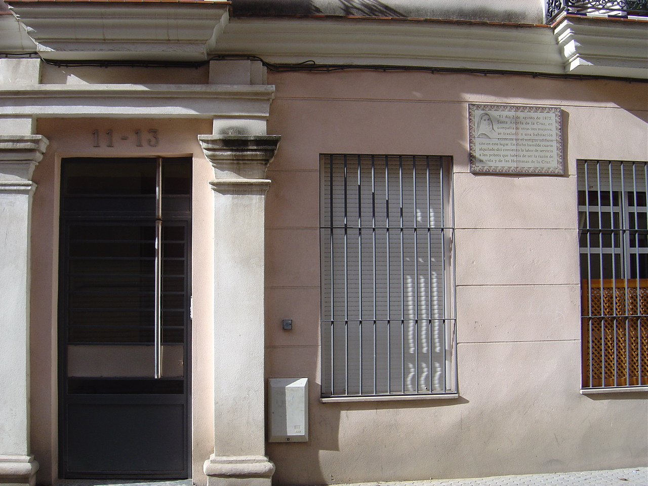 Casa en la que Santa Ángela de la Cruz instaló su primer convento.